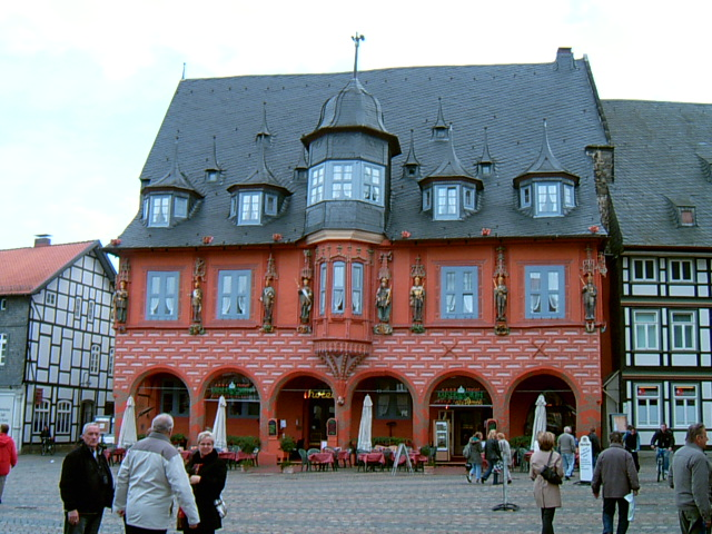 Hotel Kaiserworth Goslar